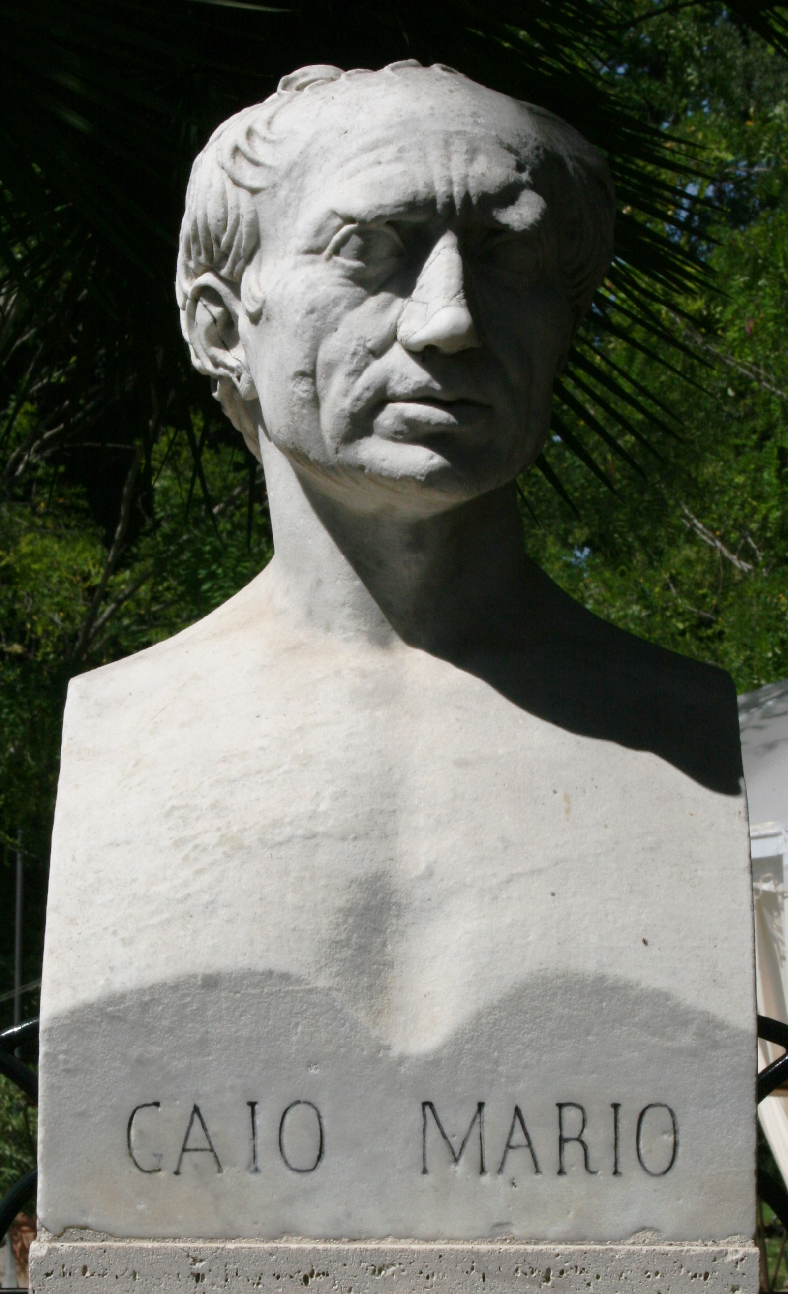 Buste de Caius Marius, jardins de la Villa Borghese à Rome.